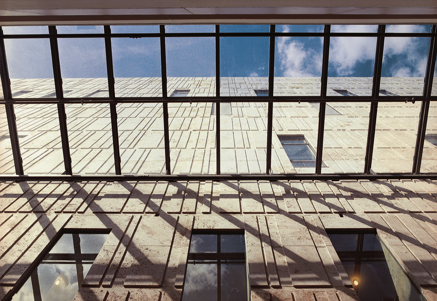 Detail der Zentralbibliothek, Architektur von Ortner & Ortner Foto: SLUB Dresden / Henrik Ahlers